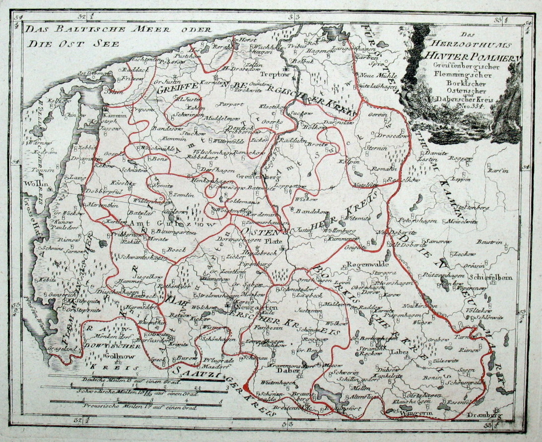 Des Herzogthums Hinter-Pommern Greiffenbergischer Flemmingscher Borkischer Ostenscher und Daberscher Kreis. Nro. 334. Kolorierter Kupferstich